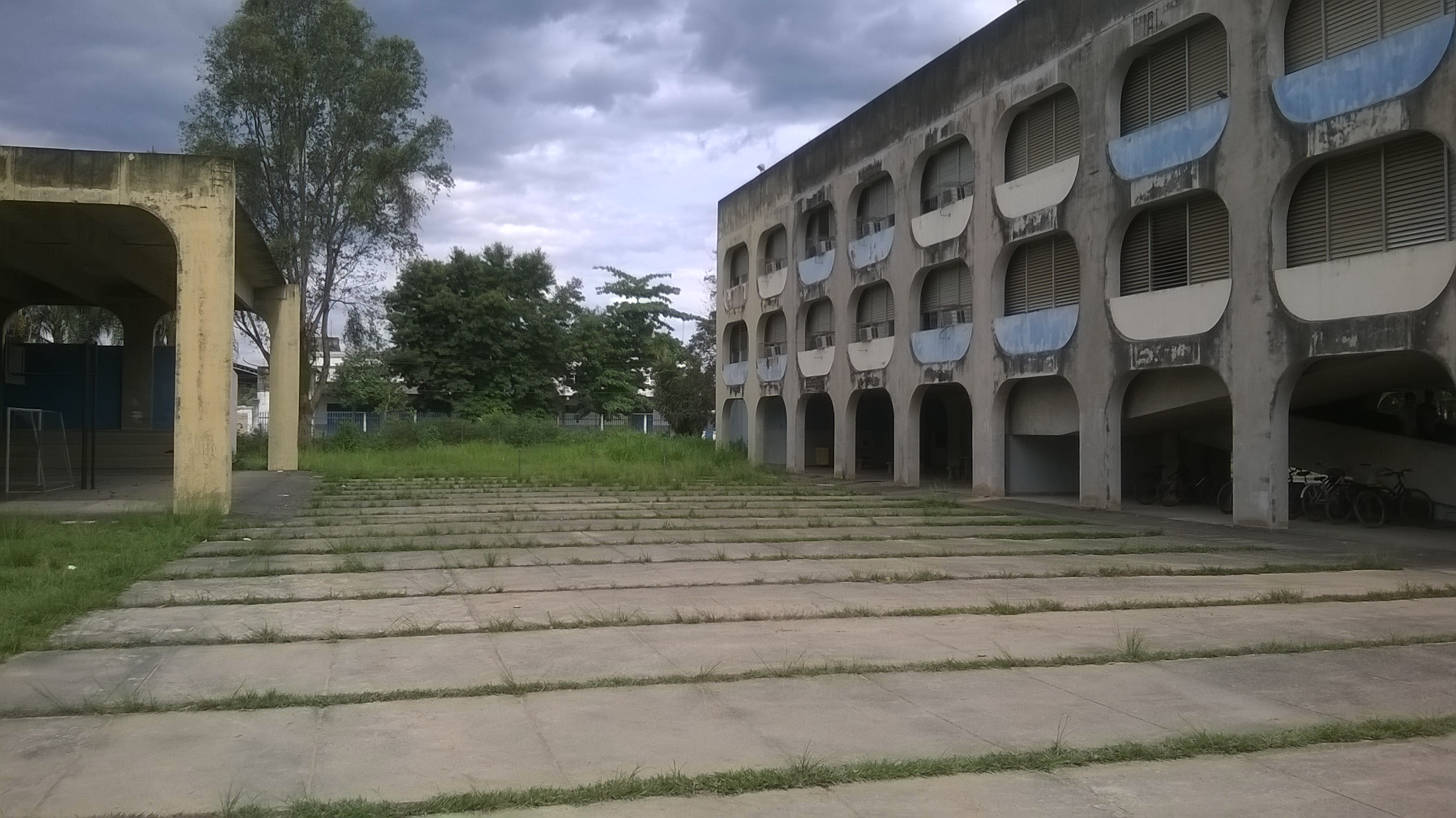 Chácaras Rio-Petrópolis, Duque de Caxias - RJ, Brazil